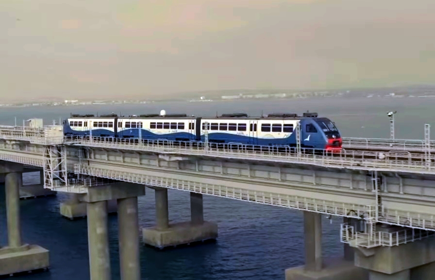 Дизель-поезд РА2 на Крымском мосту в день официального открытия ЖД-сообщения